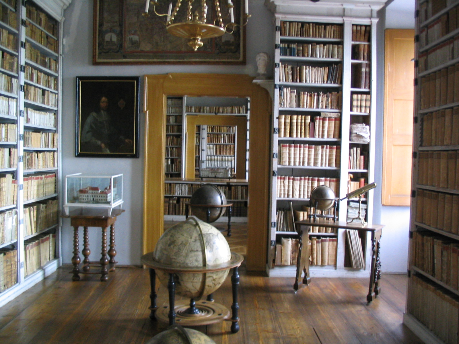 castel of Mnichovo_Hradiště, czech republic